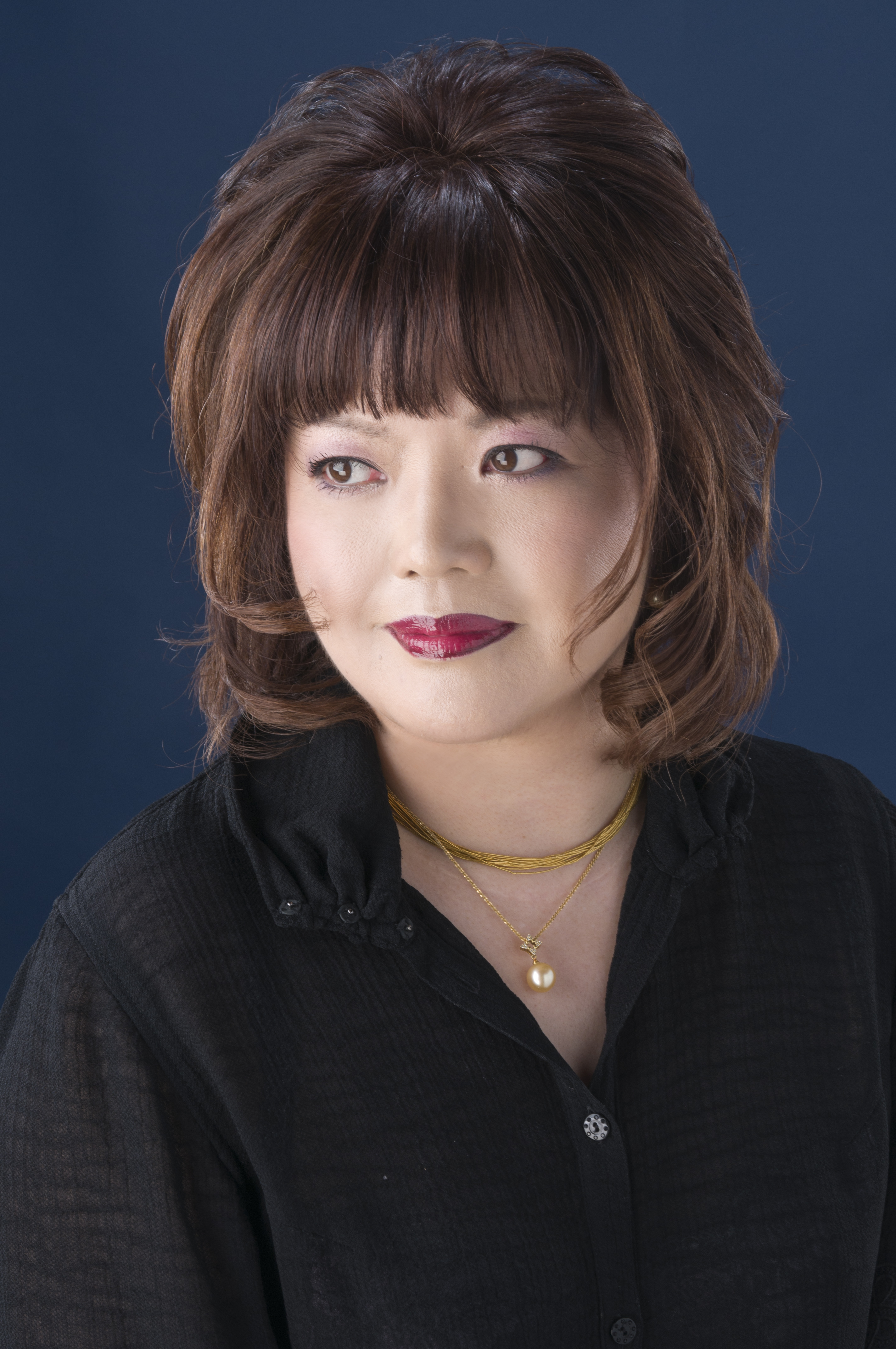 2013年現在の本人写真